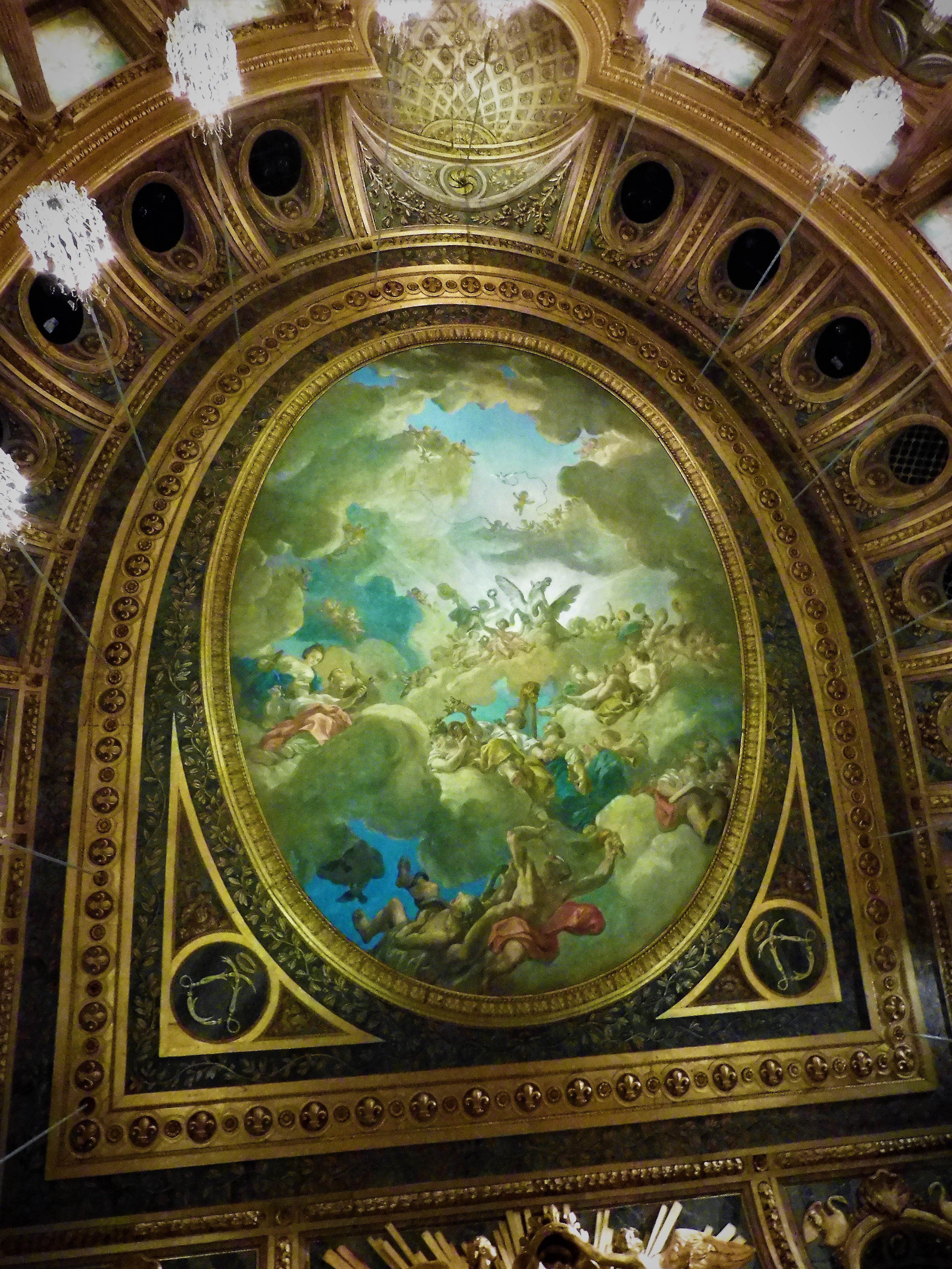 Plafond de l'opéra royal du château de Versailles.